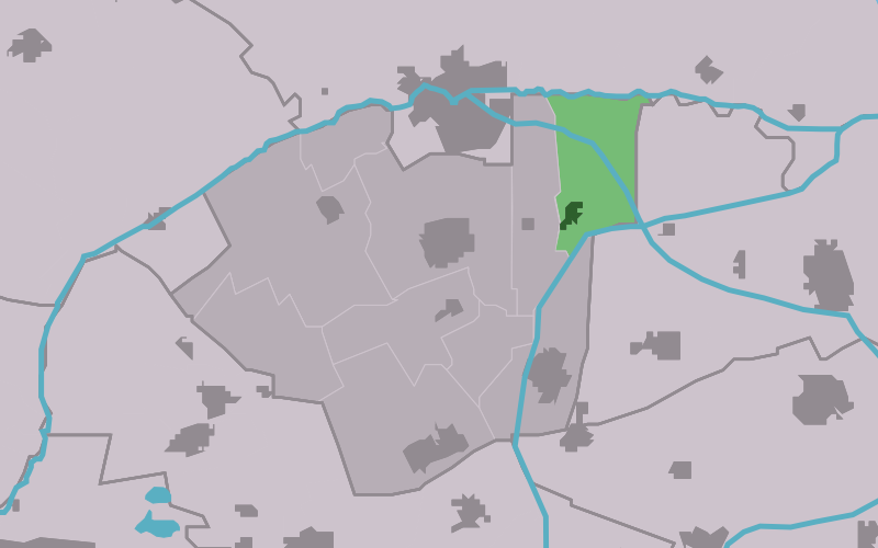 Kaartsje fan himrik fan Driezum